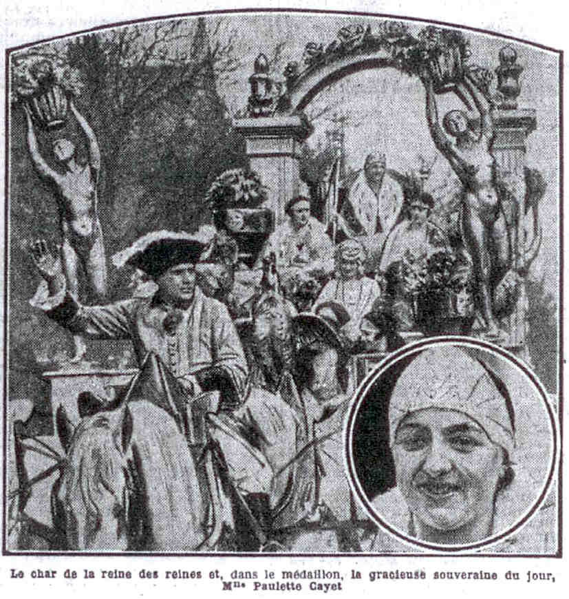 Le char de Paulette Cayet, Reine des Reines de la Mi-Carême 1928 à Paris et son portrait en médaillon.